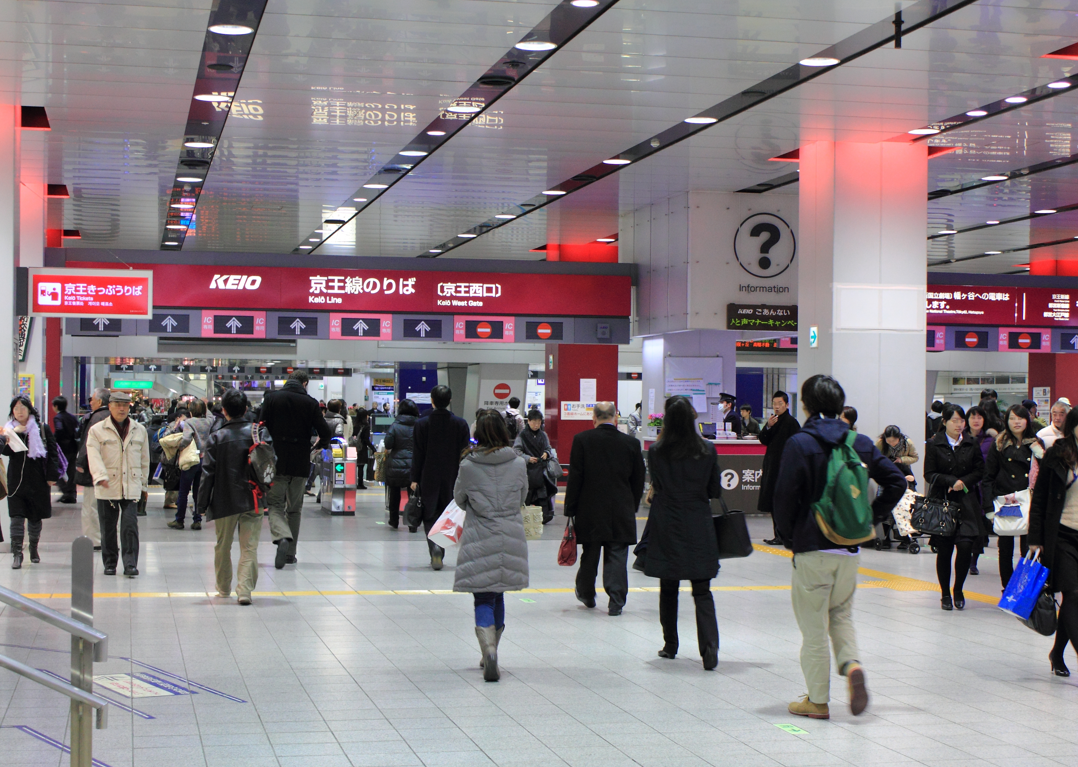 新宿駅京王西口